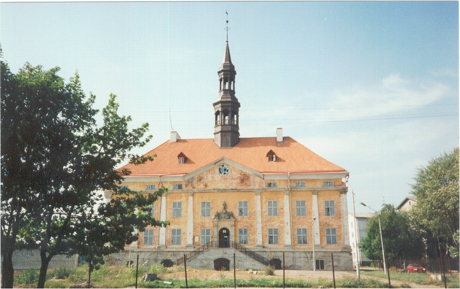 Narva gamle rådhus - old town hall of Narva